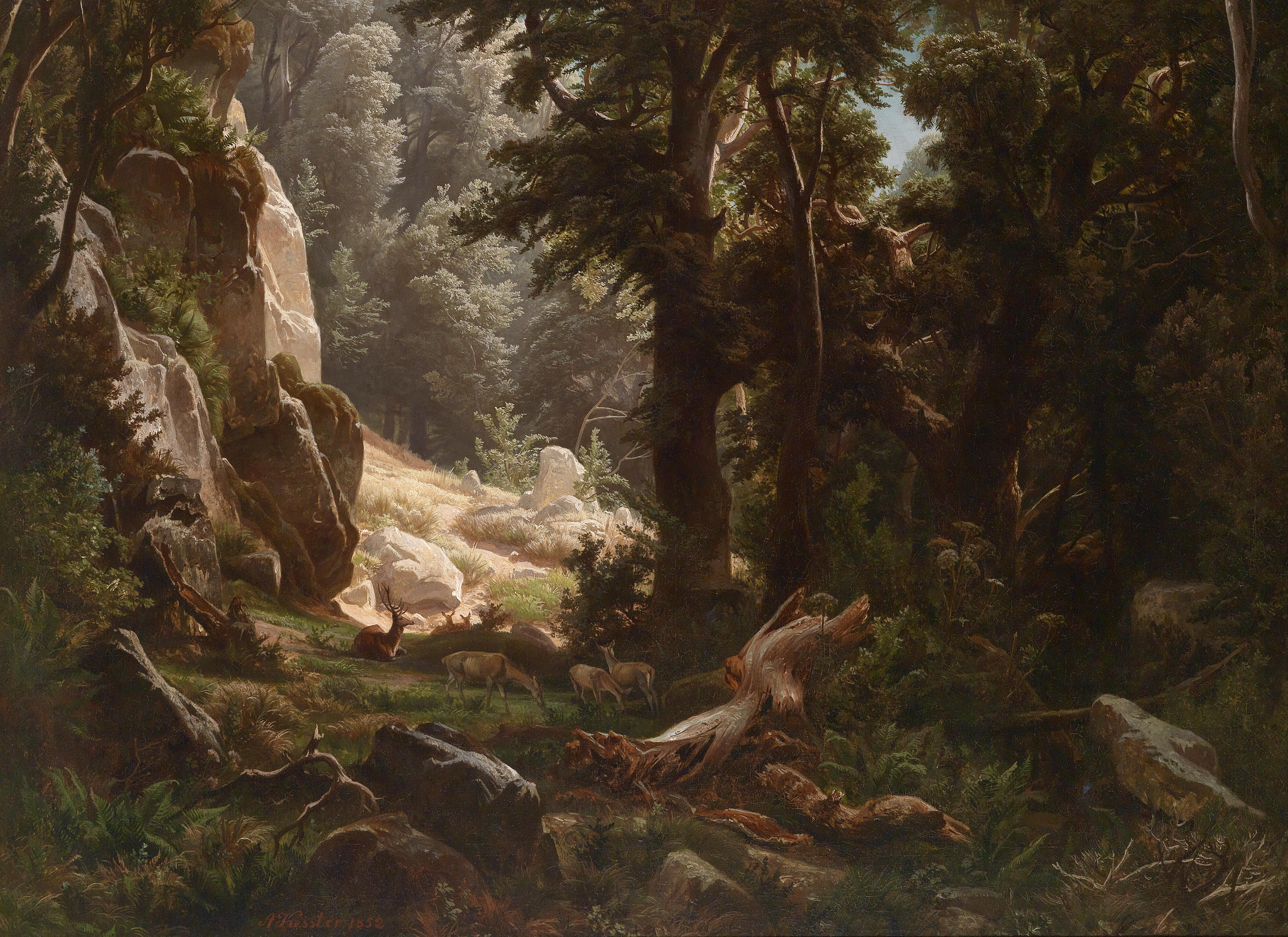 Rotwild im Waldinneren, signiert, datiert A Kessler 1852, Öl auf Leinwand, 91×123 cm